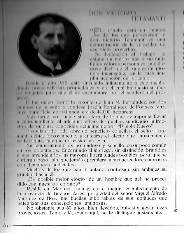 fotografia de página del anuario de juan